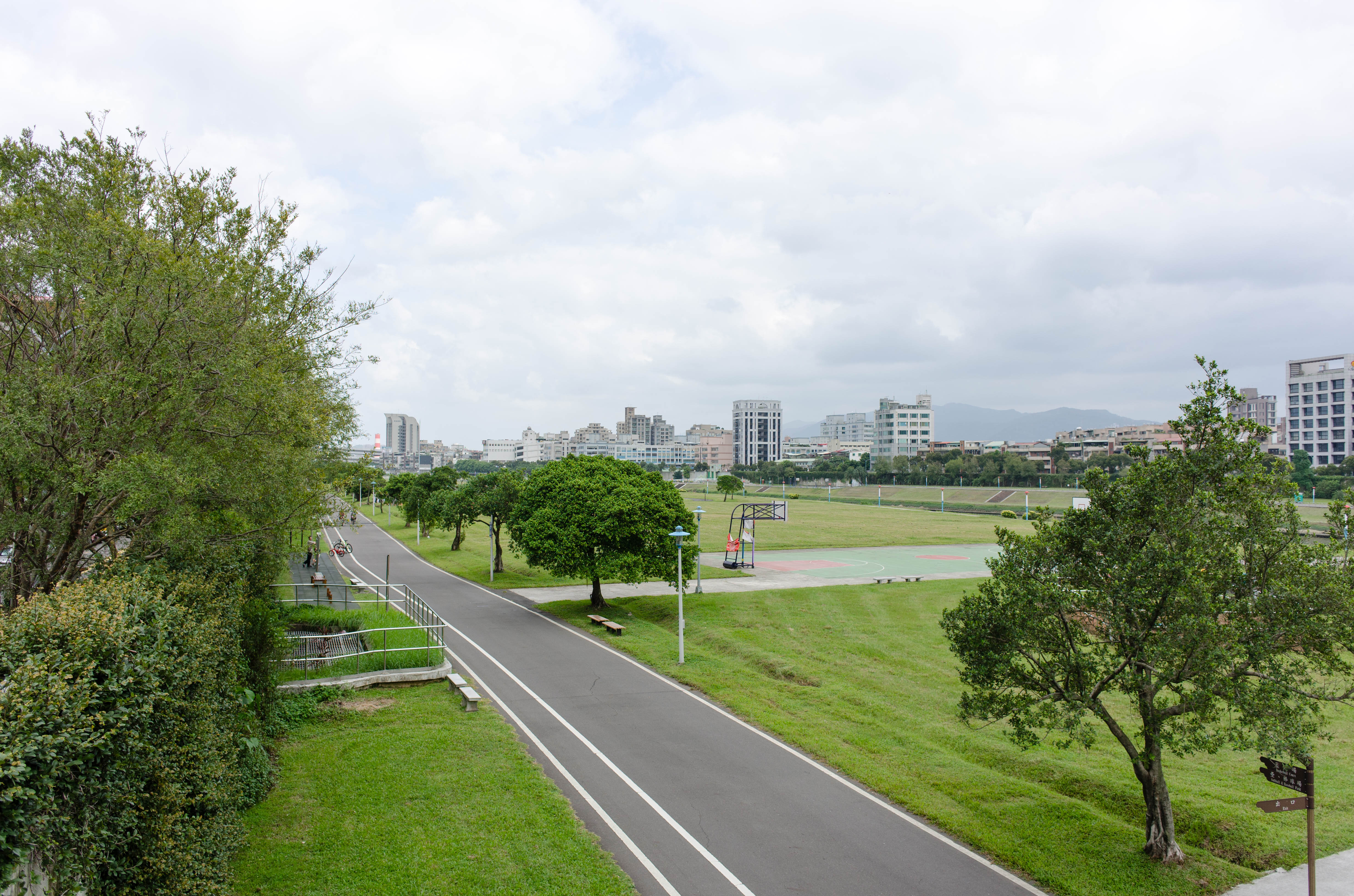 從興安宮後方堤防樓梯俯望成美右岸河濱公園。